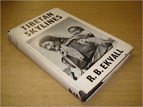 埃克瓦尔在1952年出版的《西藏的天际线》初版。